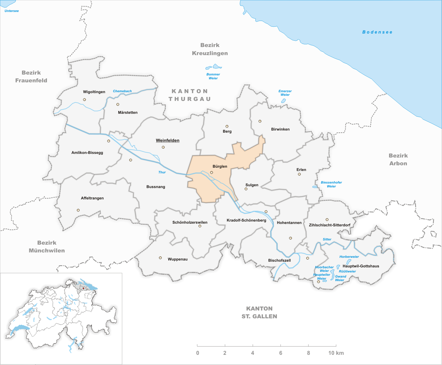 Municipality Bürglen